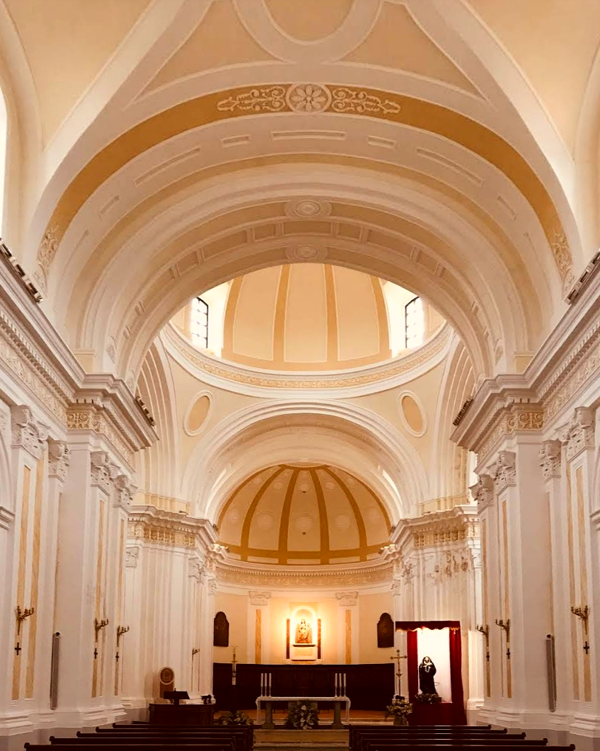 concattedrale di Marsico Nuovo This is a photo of a monument which is part of cultural heritage of Italy.